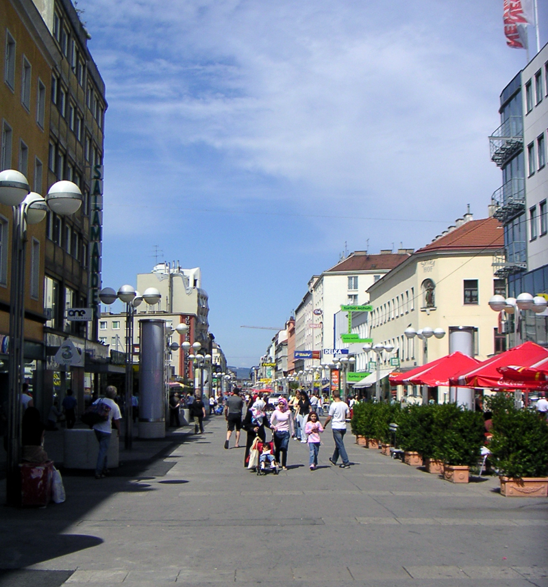 Favoritner Hauptstrasse im 10. Wiener Gemeindebezirk, selbst fotografiert am 27. August 2005